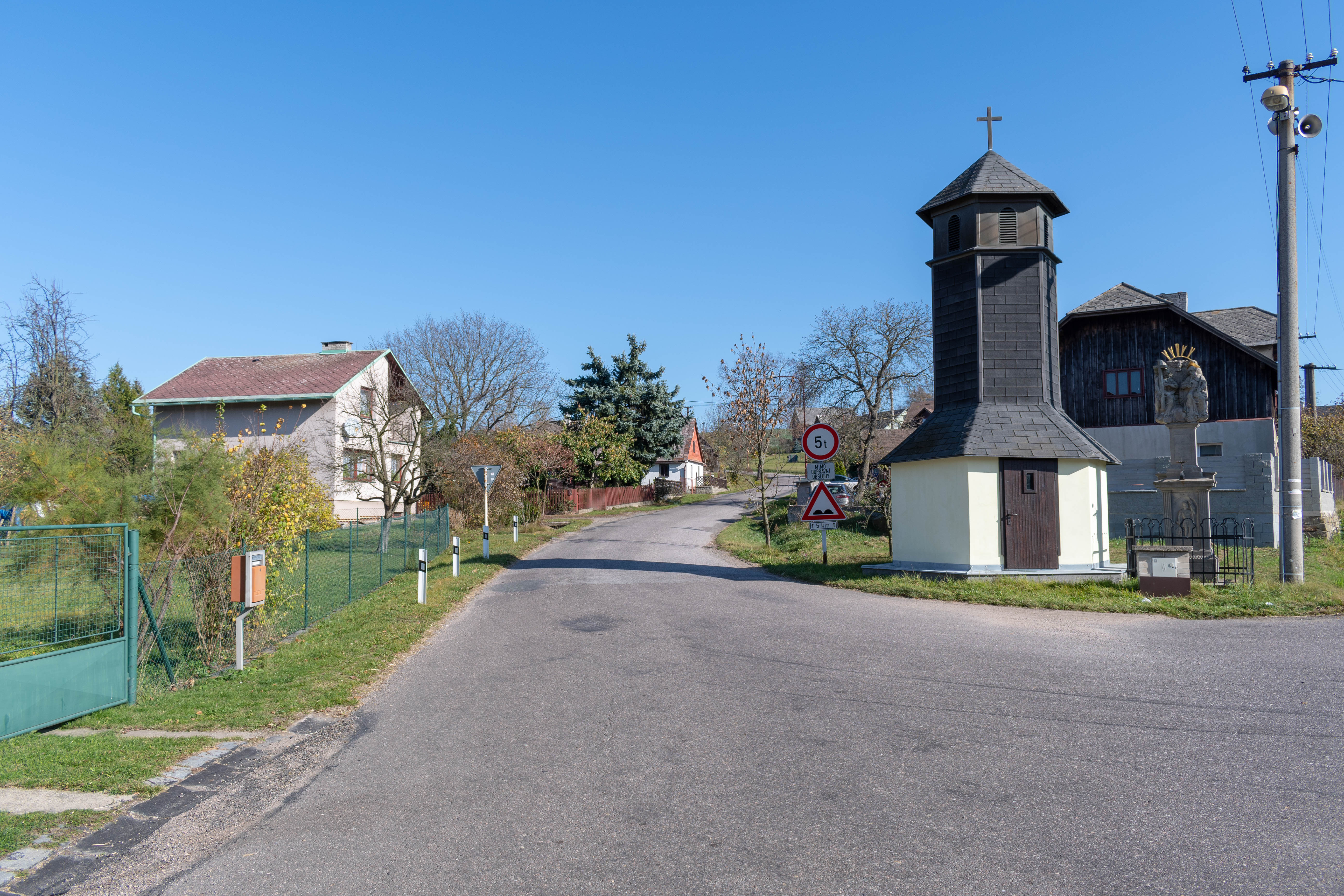 Celkový pohled na obec Bredůvka